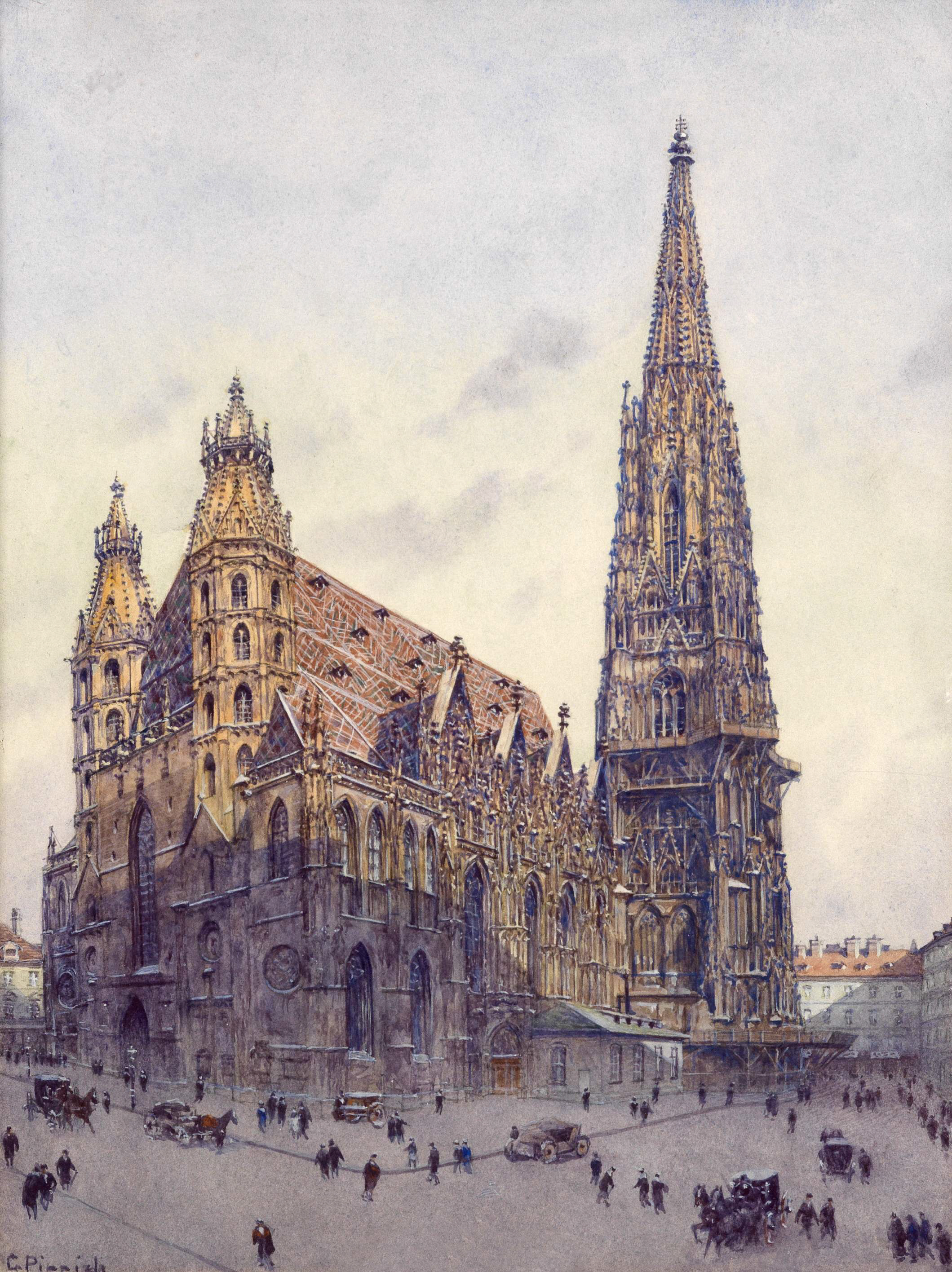 Die Stephanskirche in Wien